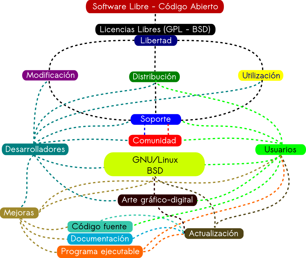 Mapa conceptual del FLOSS (Free/Libre Open Source Software - Software Libre y de Código Abierto)